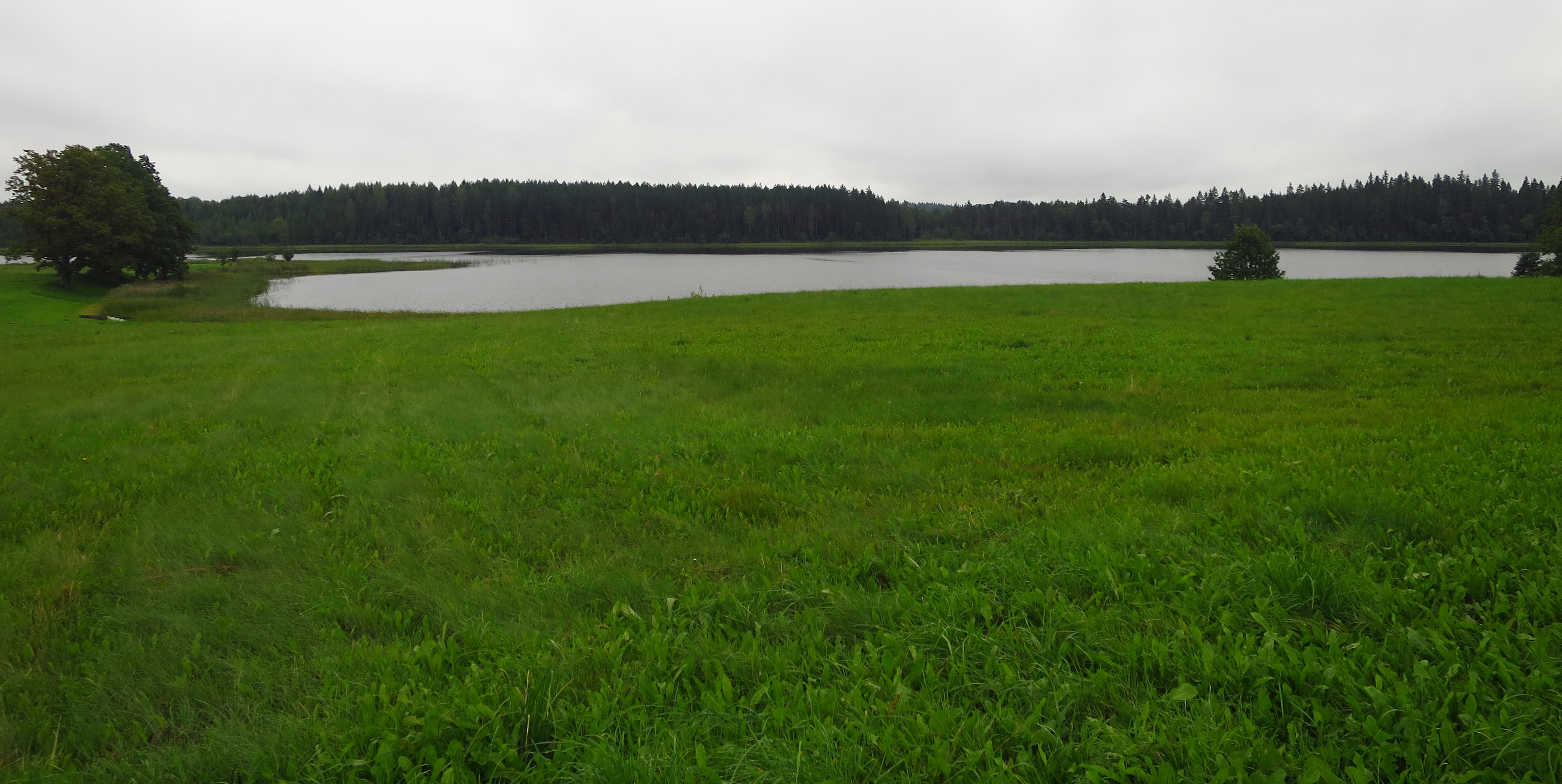 Vaade Murati järvele kirdekaldalt